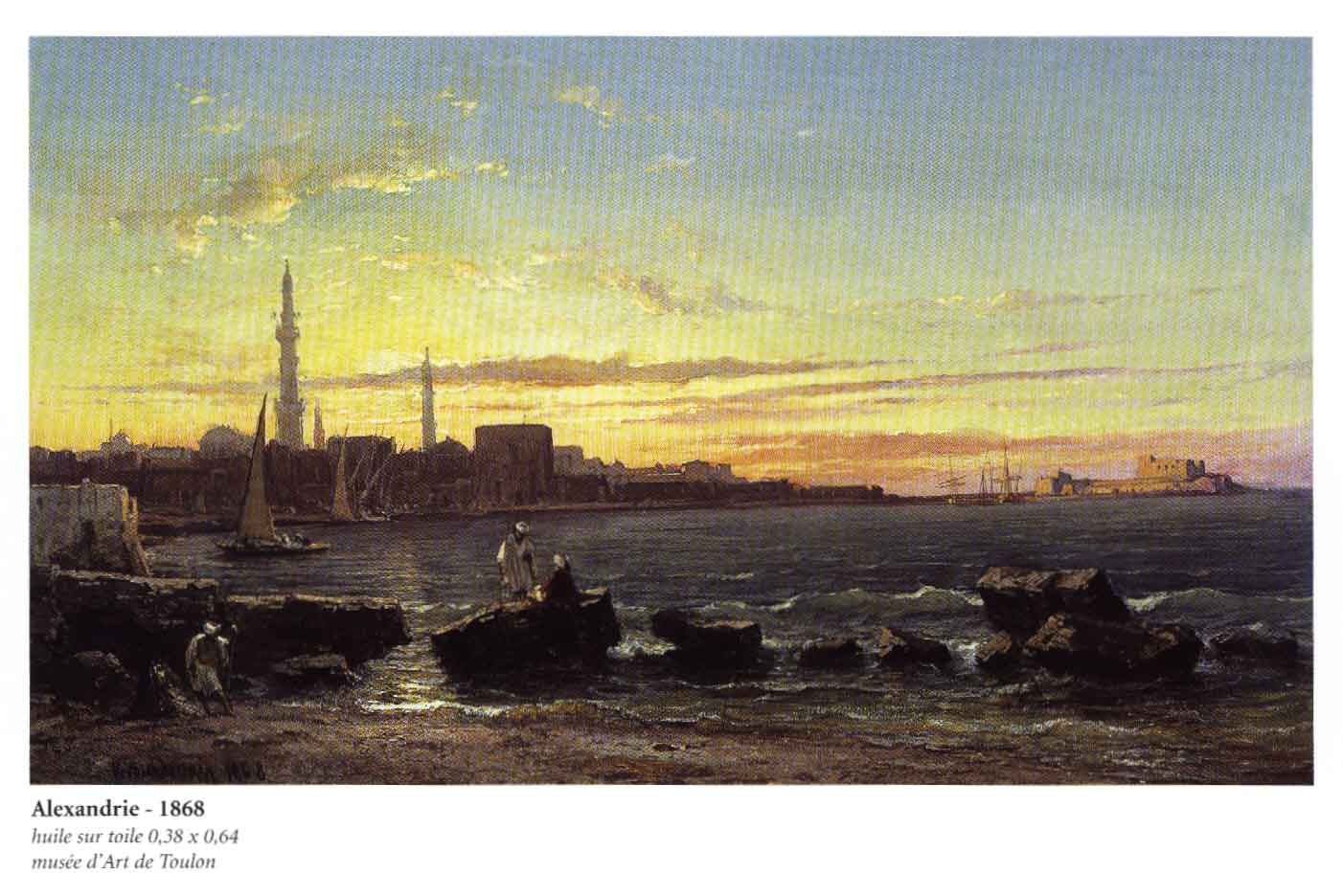 Vue du port d'Alexandrie, soleil couchant